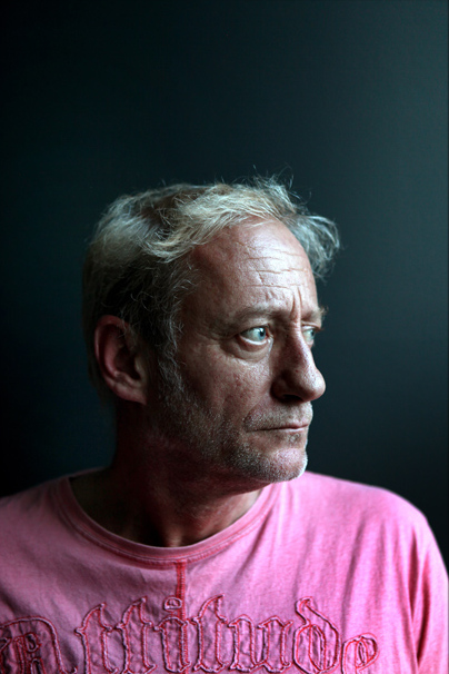 Luc Deflo